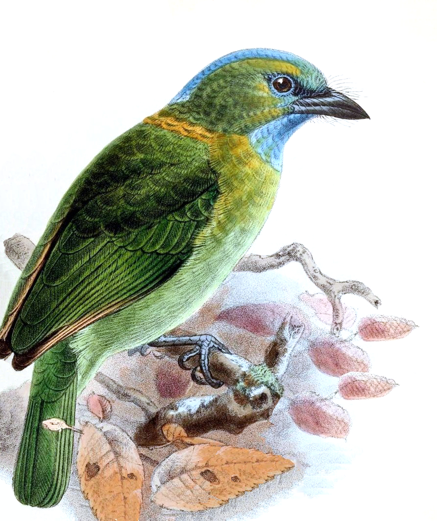 Megalaema pulcherrima